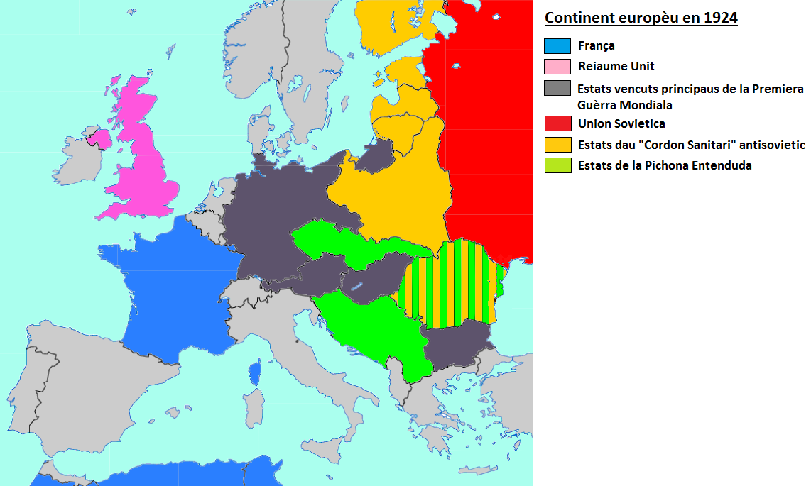 Premiera Guèrra Freja en 1924